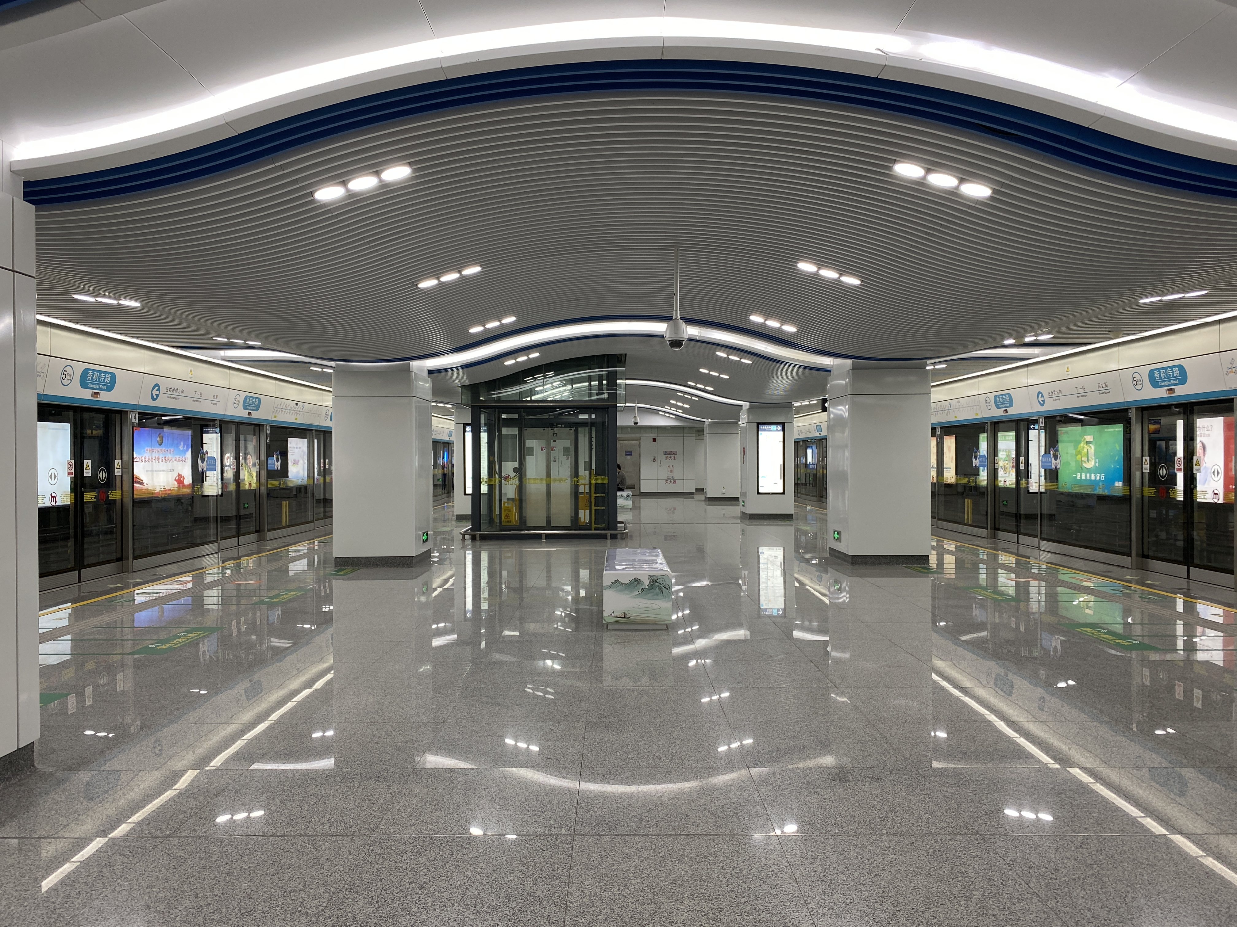 香积寺路站站台